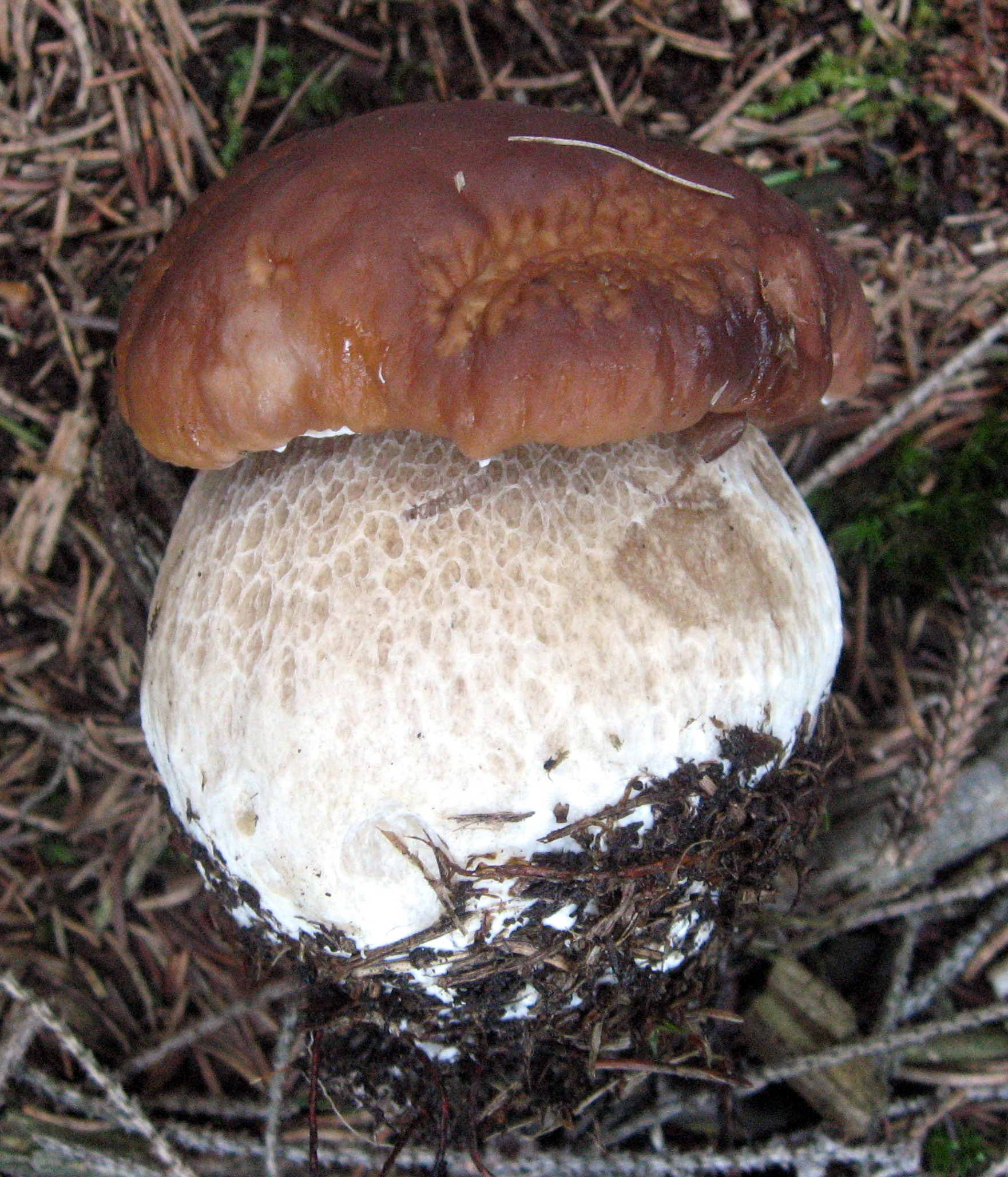 Hřib smrkový